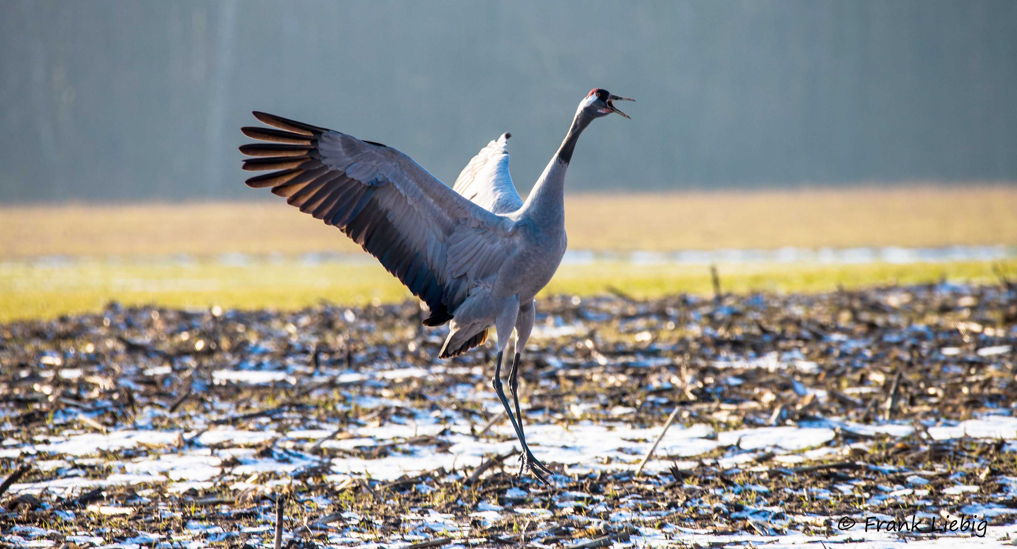 früh zurückgekehrter Kranich in Mecklenburg